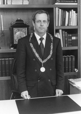 Nieuwerkerk. Gemeentehuis gemeente Duiveland. Burgemeester A.Bergshoeff (burg. Duiveland 1987-1994), bij zijn installatie.